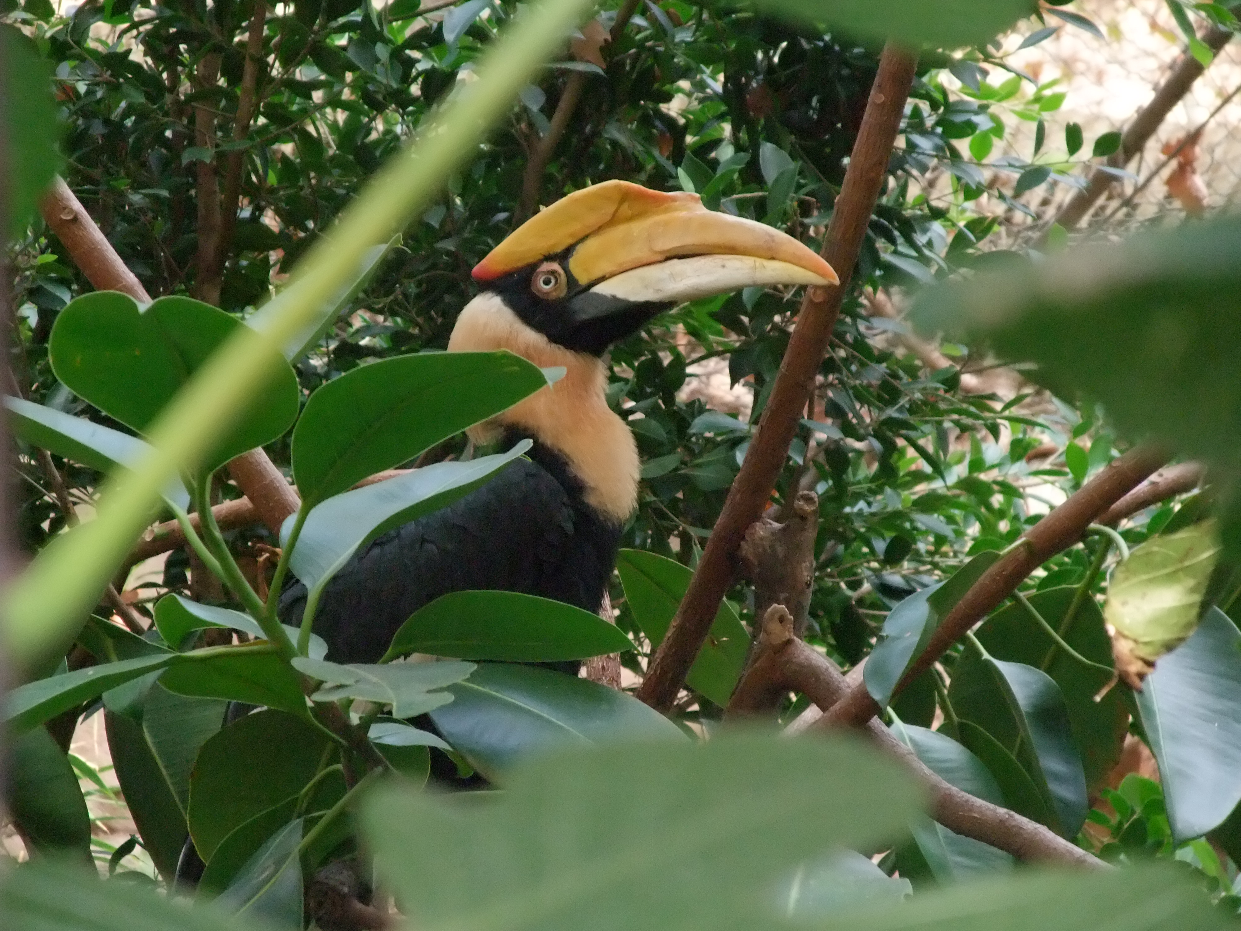 Barcelona-Zoo-Cálao bicorne (Buceros bicornis)